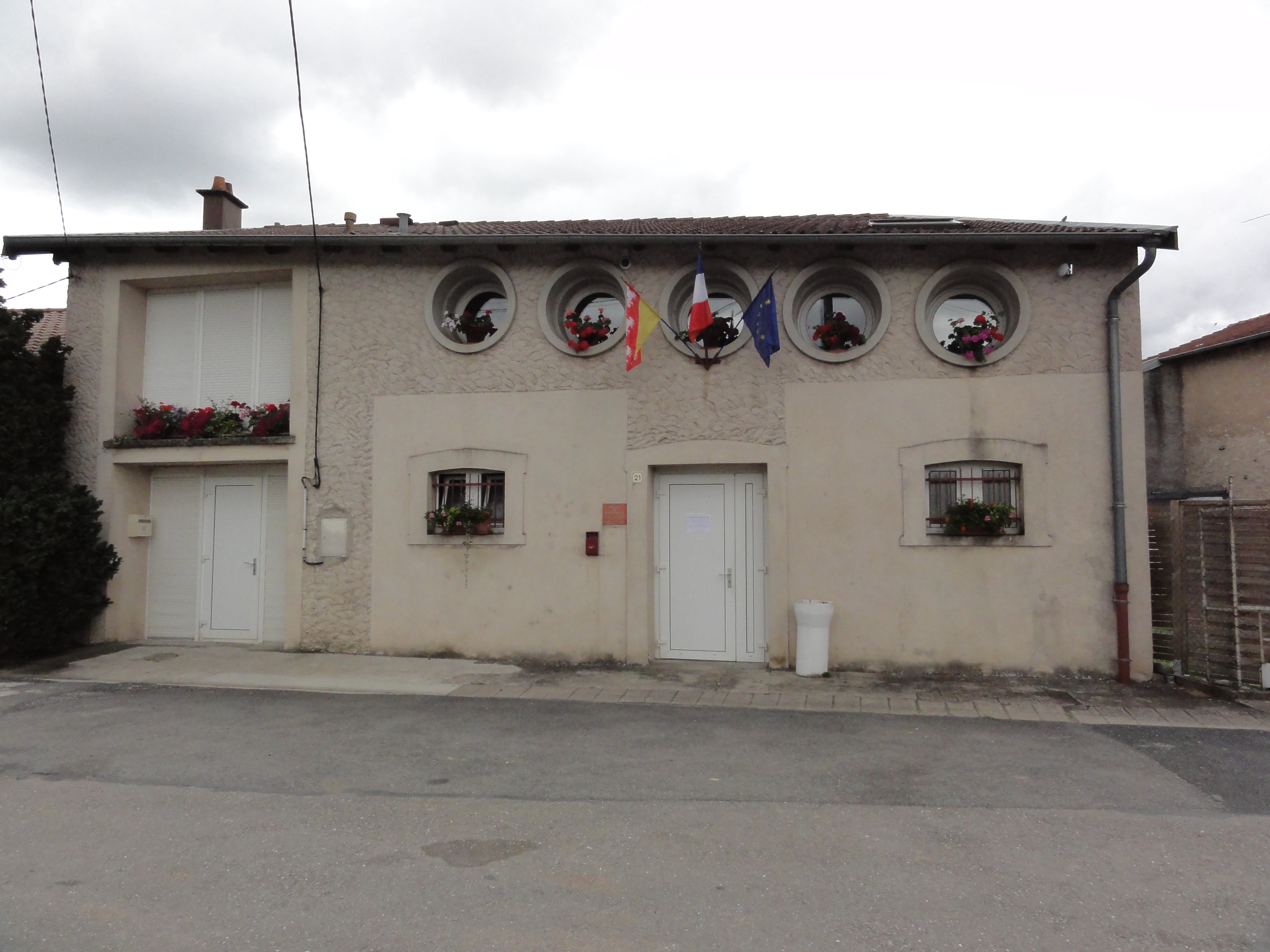 Mangonville (M-et-M) mairie